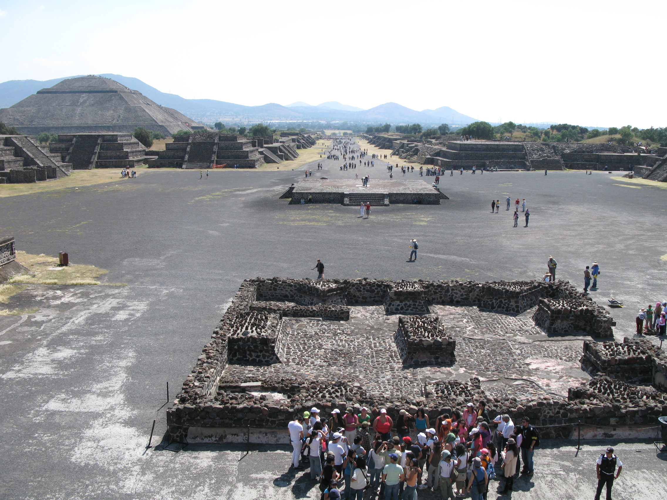 Teotihuacán, Avenija mrtvih, Mehika.